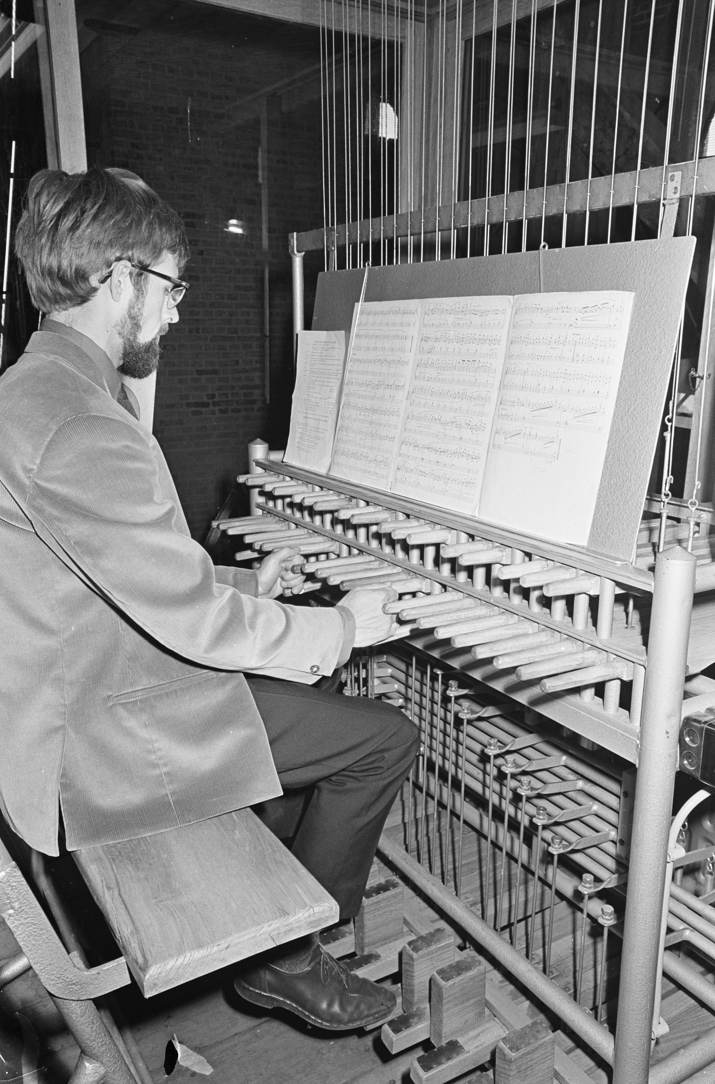 Collectie / Archief : Fotocollectie Anefo Reportage / Serie : [ onbekend ] Beschrijving : Nieuwe carrillon in Grote Kerk te Dordrecht in gebruik genomen, Arie Abbenes bespeelt beiaard Datum : 5 mei 1966 Locatie : Dordrecht Trefwoorden : BEIAARDEN, carrillons, kerken Persoonsnaam : Arie Abbenes Instellingsnaam : Grote Kerk Fotograaf : Nijs, Jac. de / Anefo Auteursrechthebbende : Nationaal Archief Materiaalsoort : Negatief (zwart/wit) Nummer archiefinventaris : bekijk toegang 2.24.01.05 Bestanddeelnummer : 919-1123